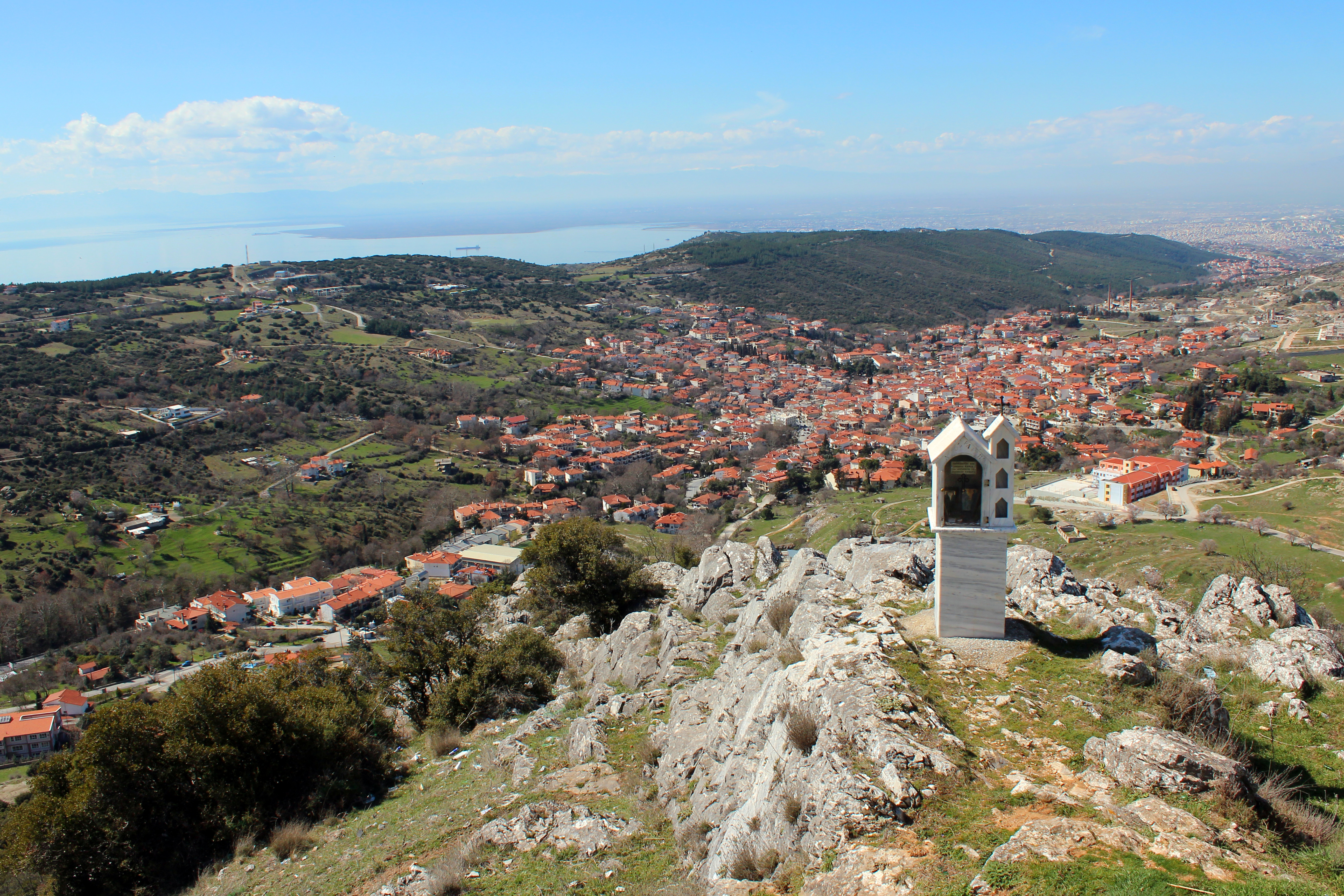 Ασβεστοχώρι